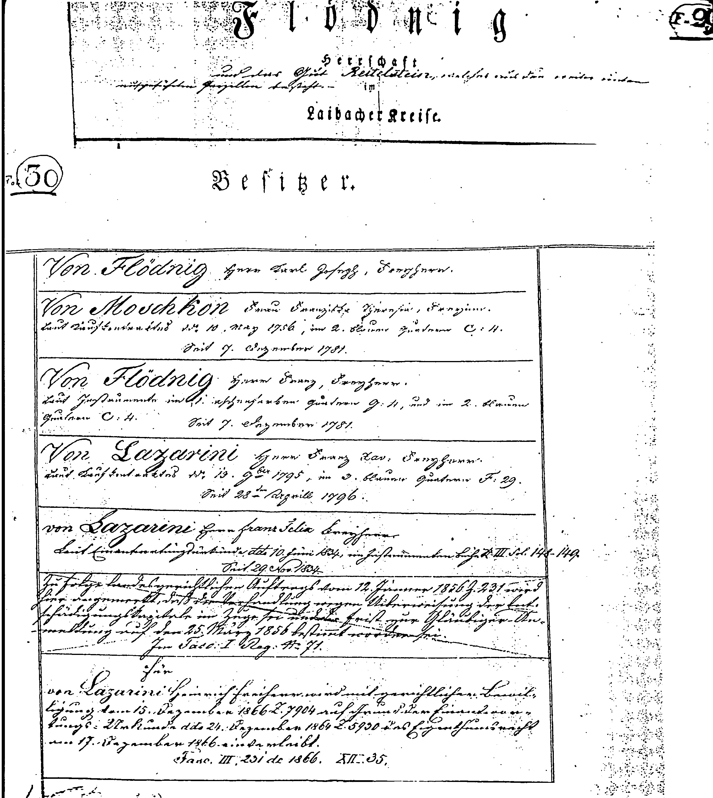 Deželna deska za Kranjsko, vložek v glavni knjigi za gospostvo Smlednik (Flödnig), posestni list (fol.29).